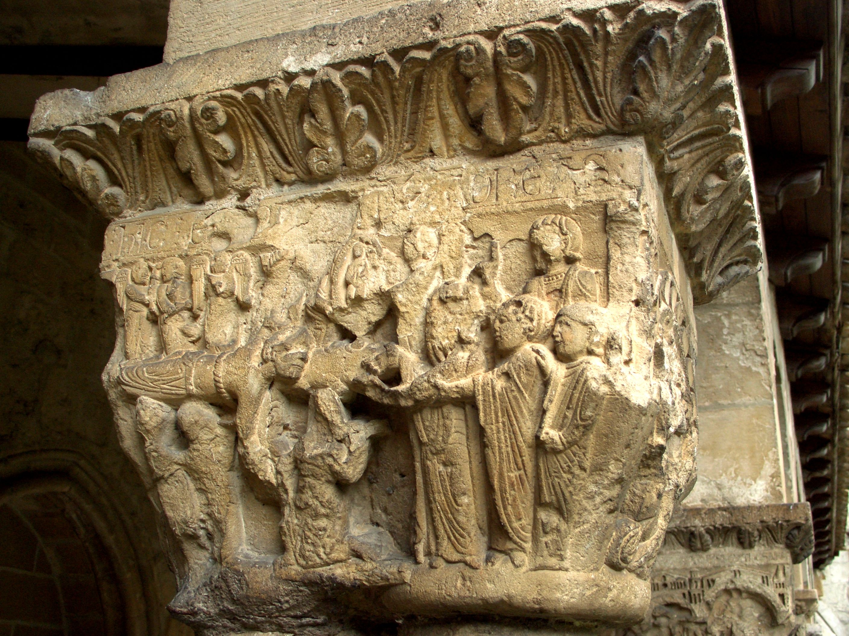 Lizarra - Sant Pere de la Rúa - Claustre - Capitell